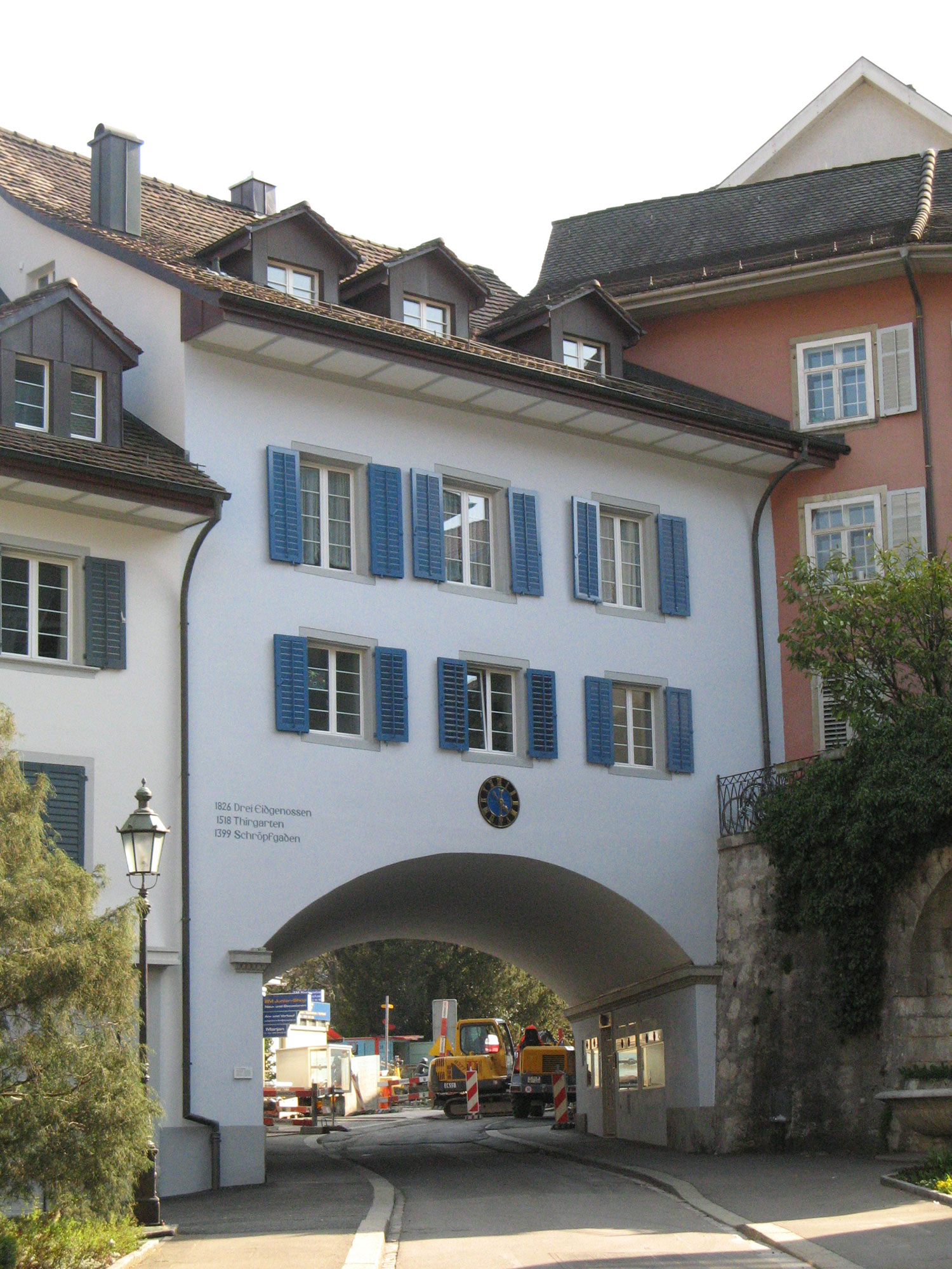 Ehemaliges Hotel "Zu den drei Eidgenossen" im Bäderquartier von Baden